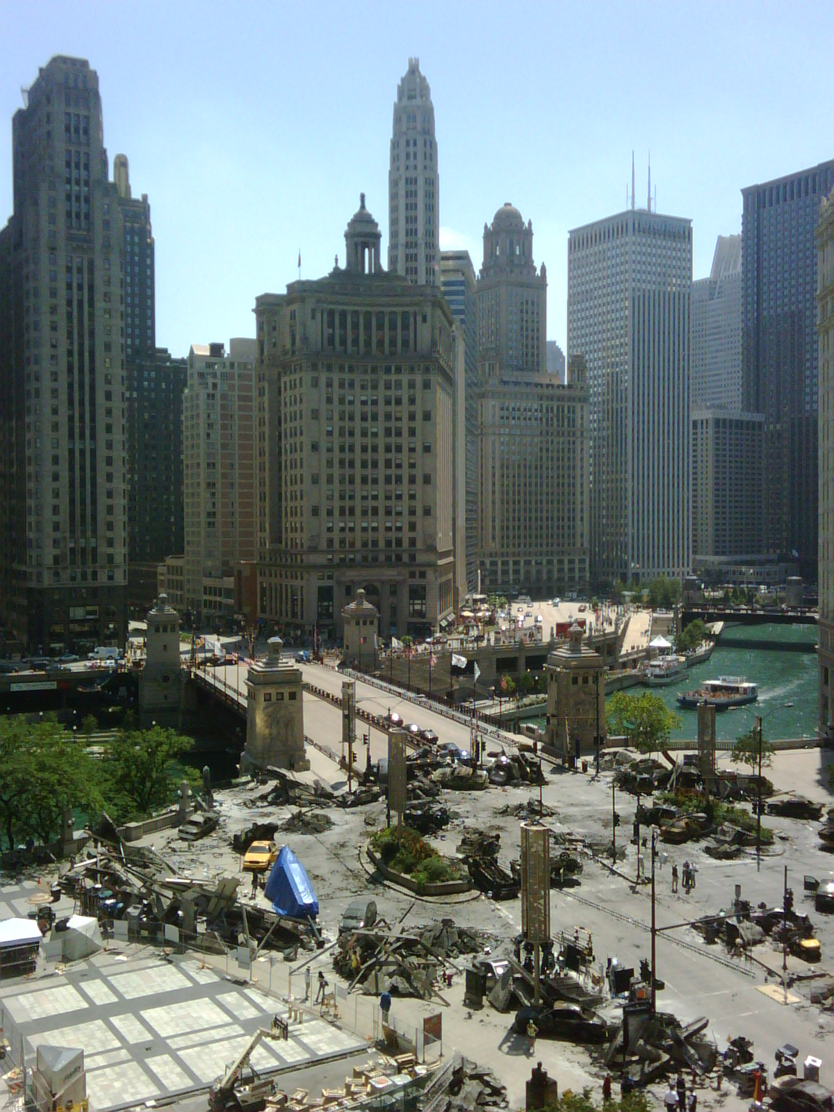 Transformers 3 Movie Set